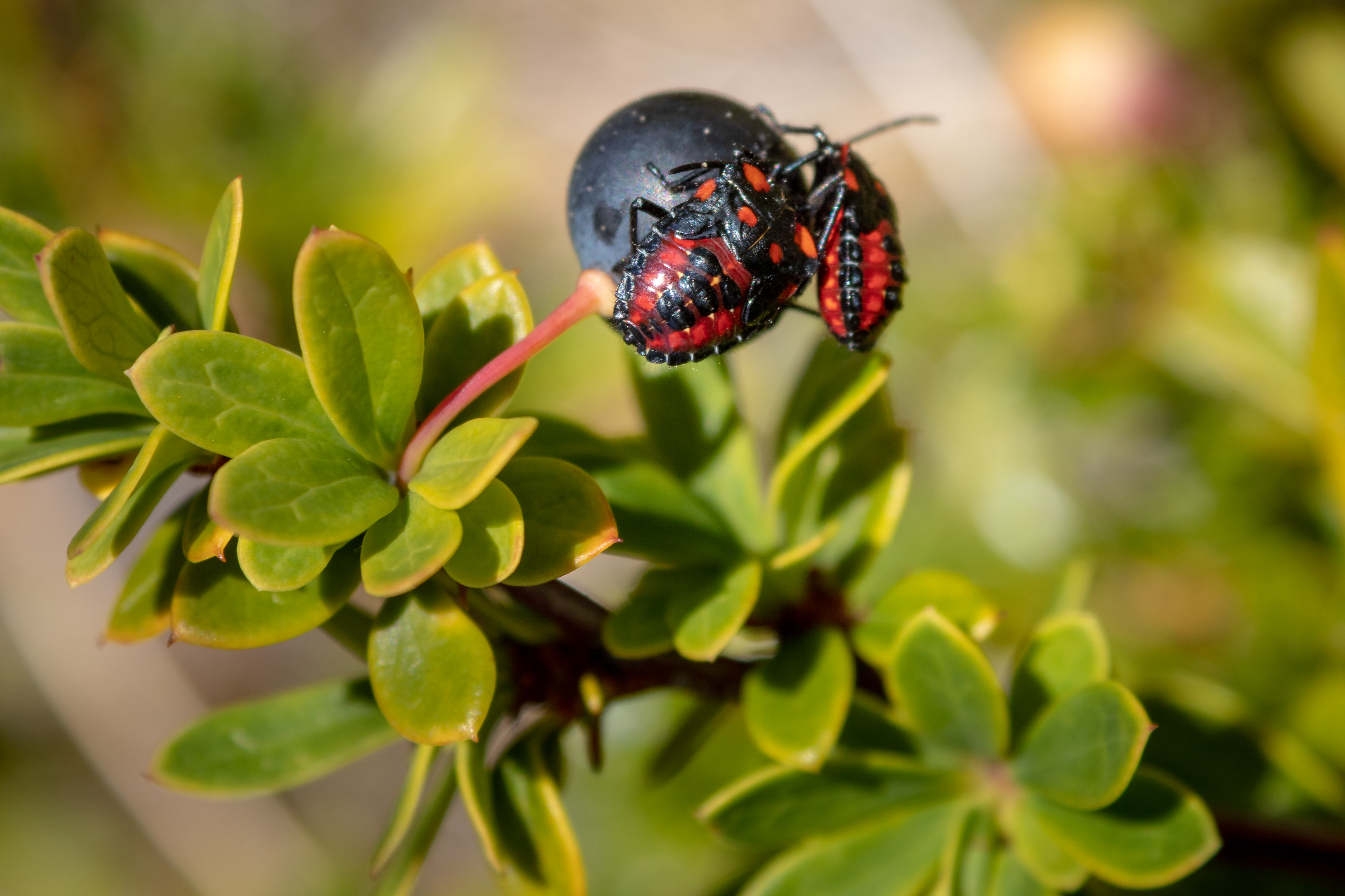 Chinche del Calafate, Parque Nacional Torres del Paine. Región de Magallanes, Chile.